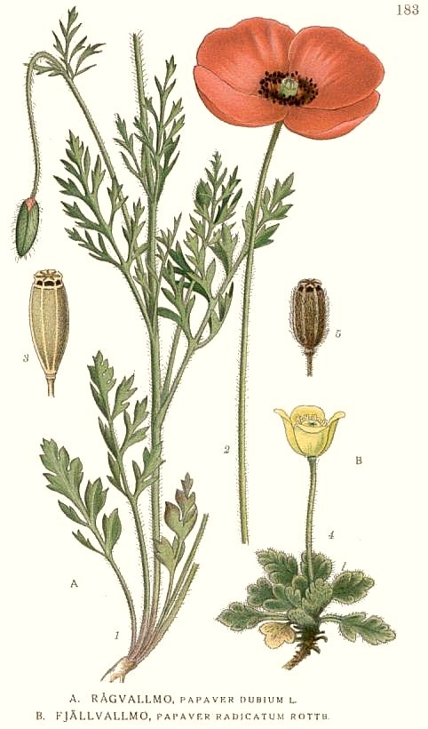 Papaver dubium L., Papaver radicatum Rotth. Original Description A. Rågvallmo, Papaver dubium L. B. Fjällvallmo, Papaver radicatum Rottb.